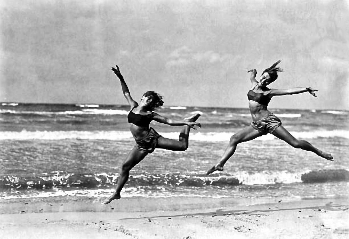 Zwei Tänzerinnen der Jutta-Klamt-Schule am Strand der Ostsee, Foto veröffentlicht in der Berliner Zeitung am 3. Juni 1928